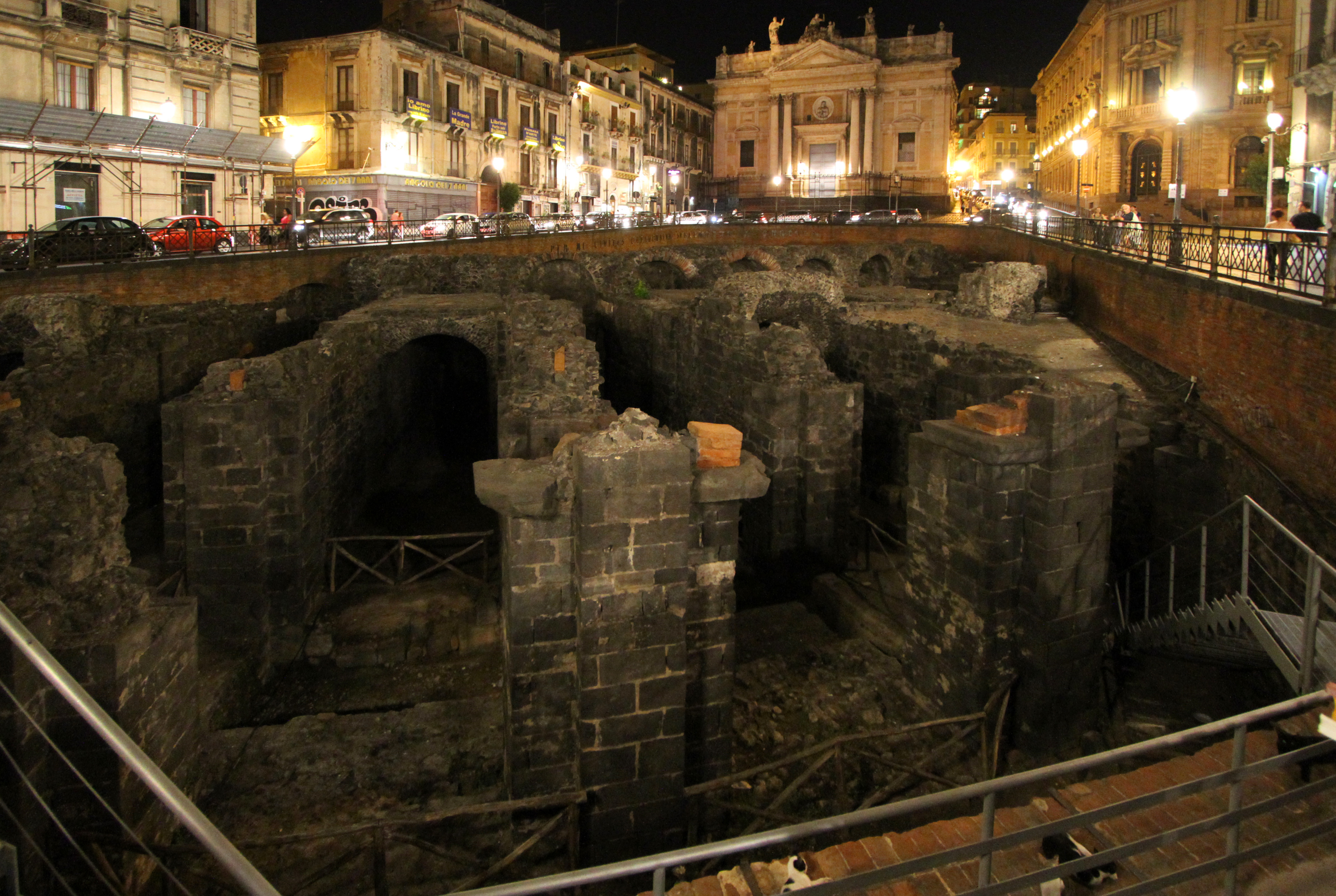 Catania: Piazza Stesicoro e resti dell'Anfiteatro Romano